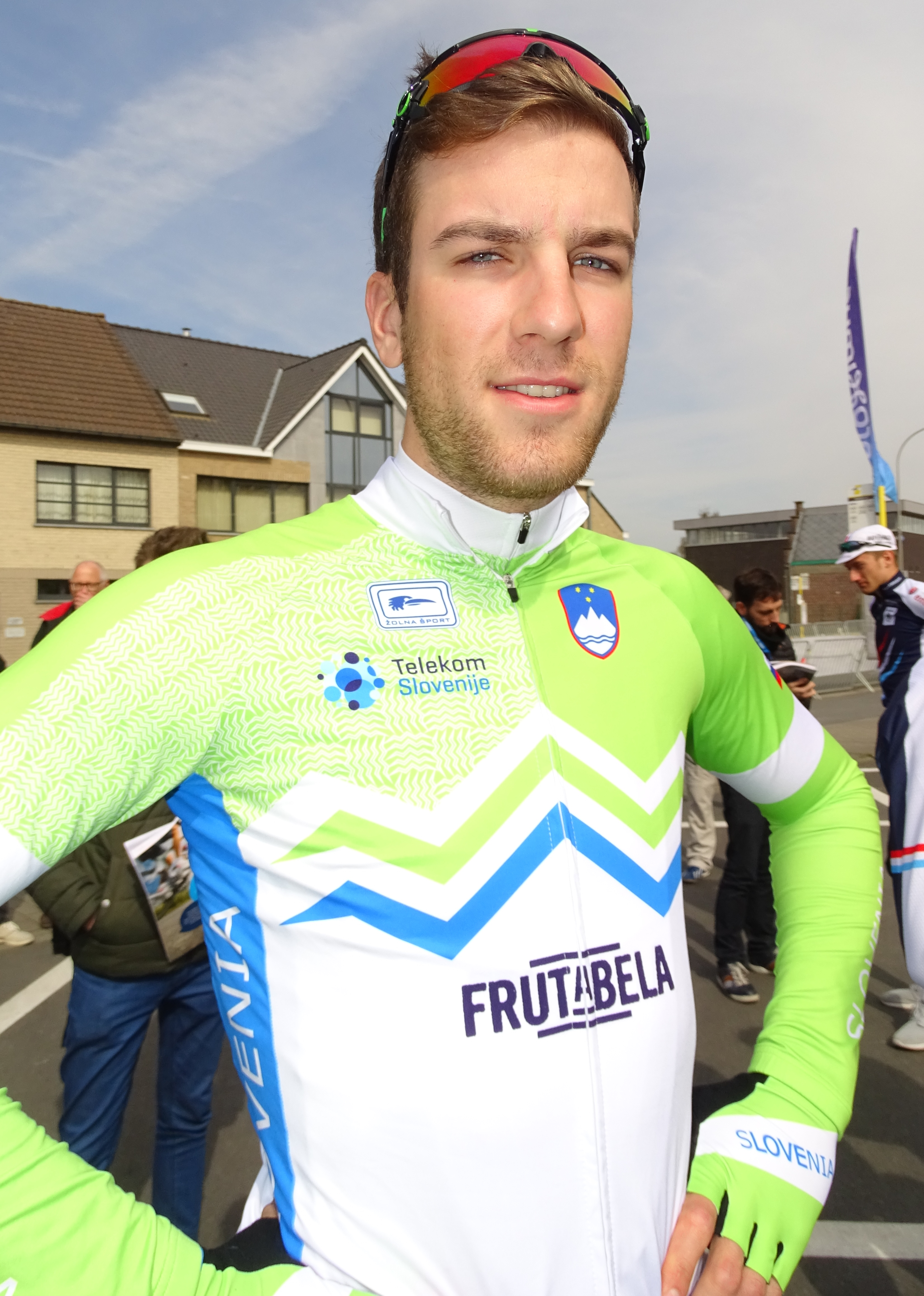 Reportage réalisé le samedi 9 avril à l'occasion du départ et de l'arrivée du Tour des Flandres espoirs 2016 à Audenarde, Belgique.